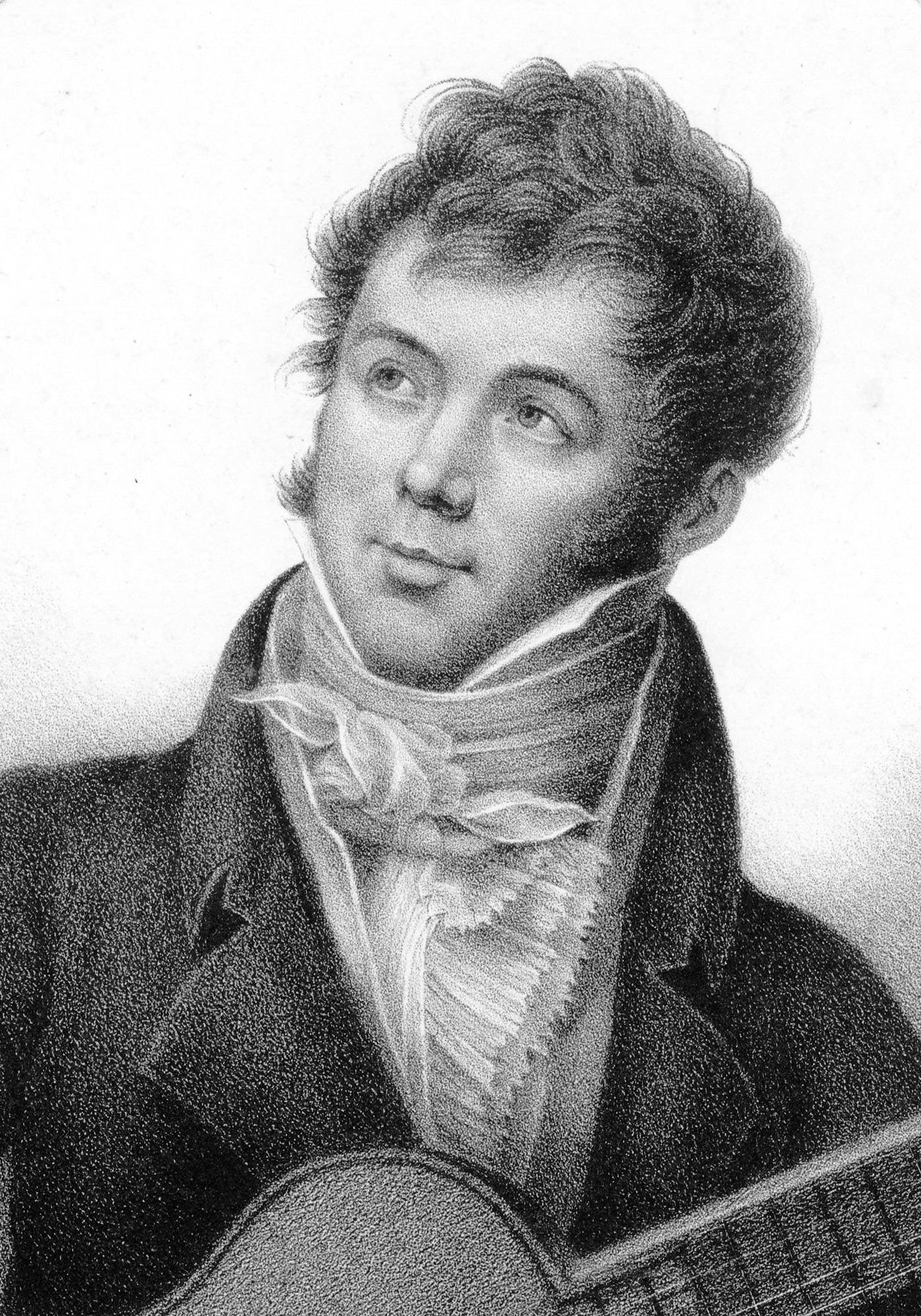 Fernando Sor